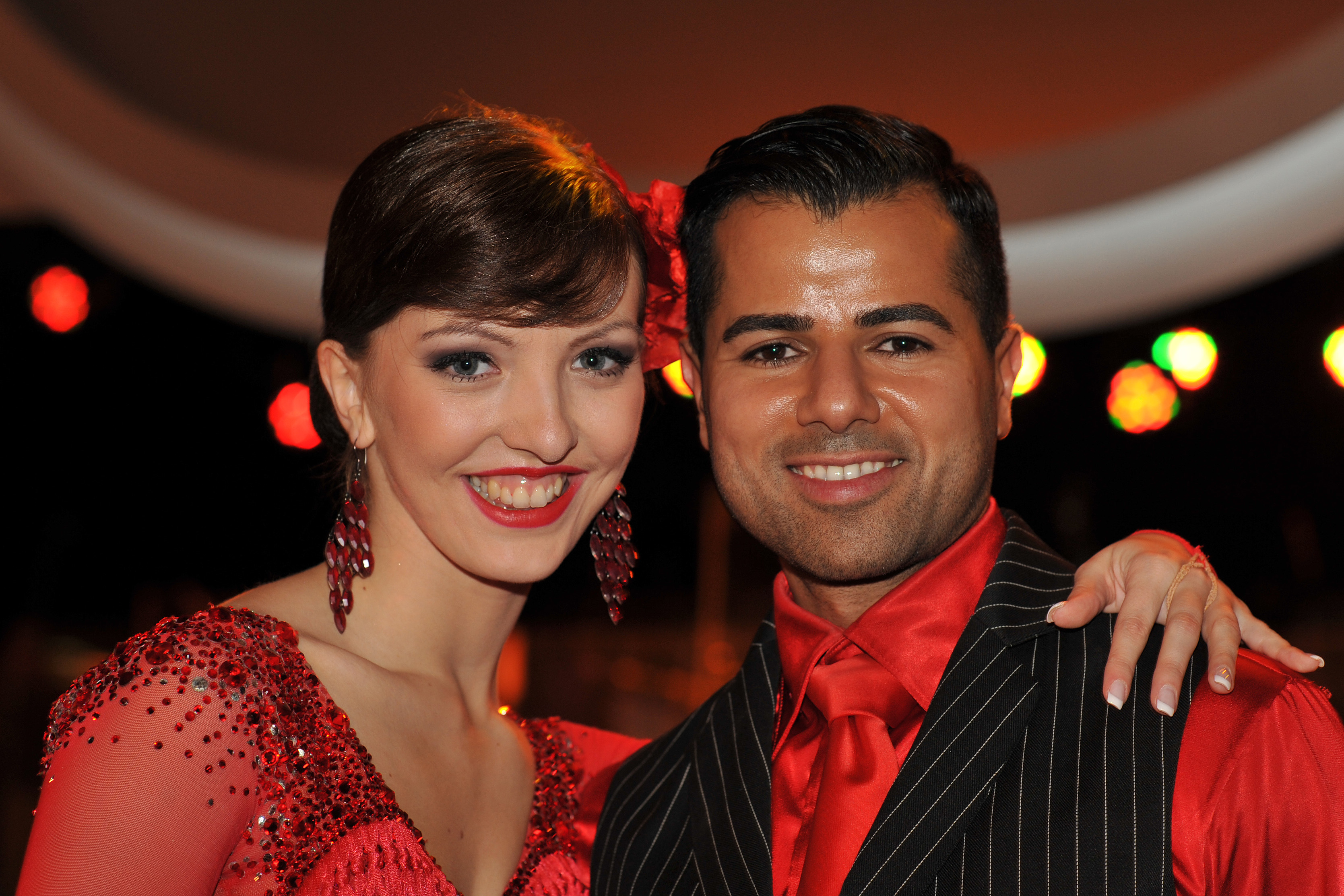 Dancing Stars am 21. März 2014: Morteza Tavakoli, Julia Burghardt